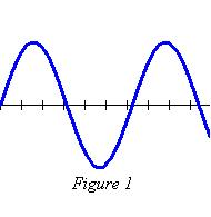 Description: Représentation graphique toute petite d'un sinus tout simple Source: Laza_82 Licence: GFDL